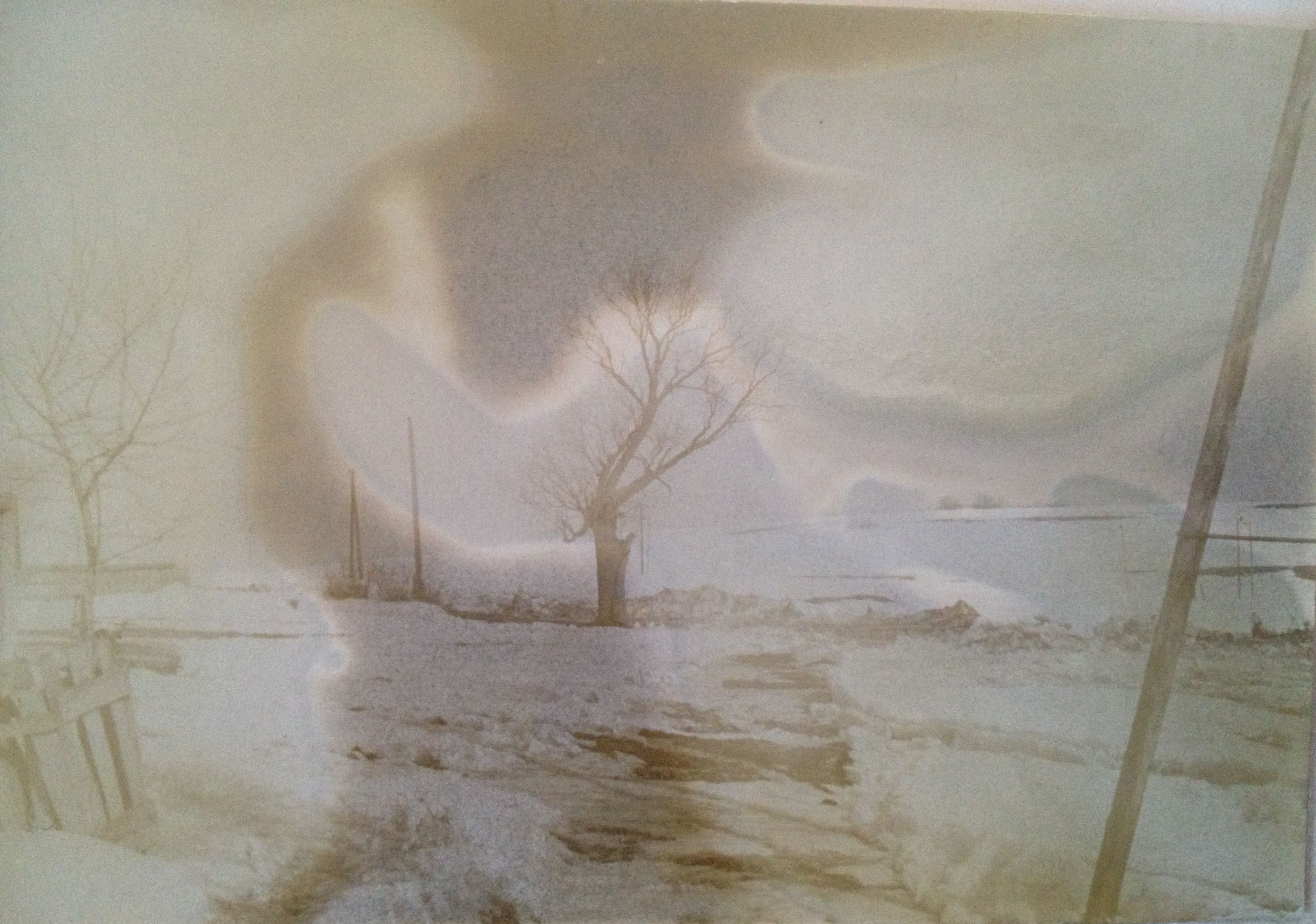 дерево на краю деревни Суксу перед сельсоветом